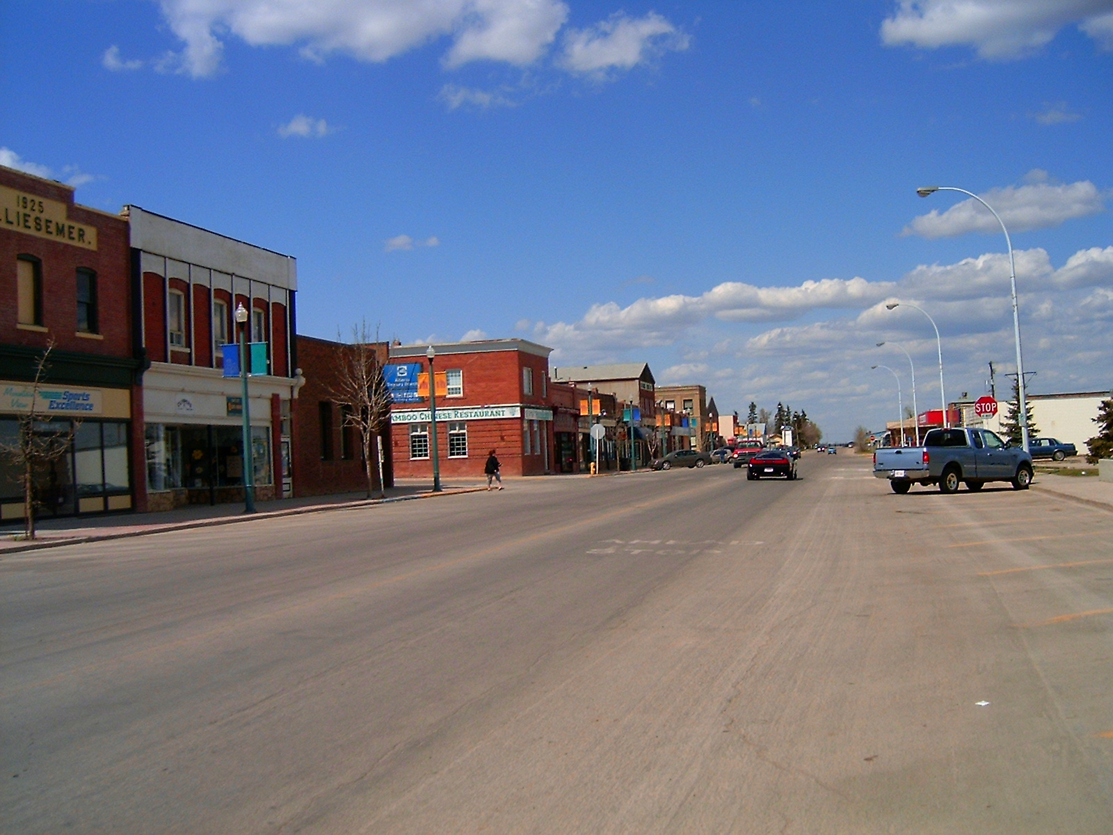 Alberta mainstreet Didsbury 018